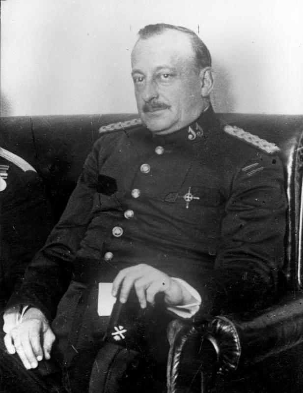 Der Ex-Diktator Spaniens, Primo de Rivera gestorben ! Aufnahmen aus der Glanzzeit seiner Diktatur. Porträt des spanischen Ex-Diktator Primo de Revera. Information added by Wikimedia users.